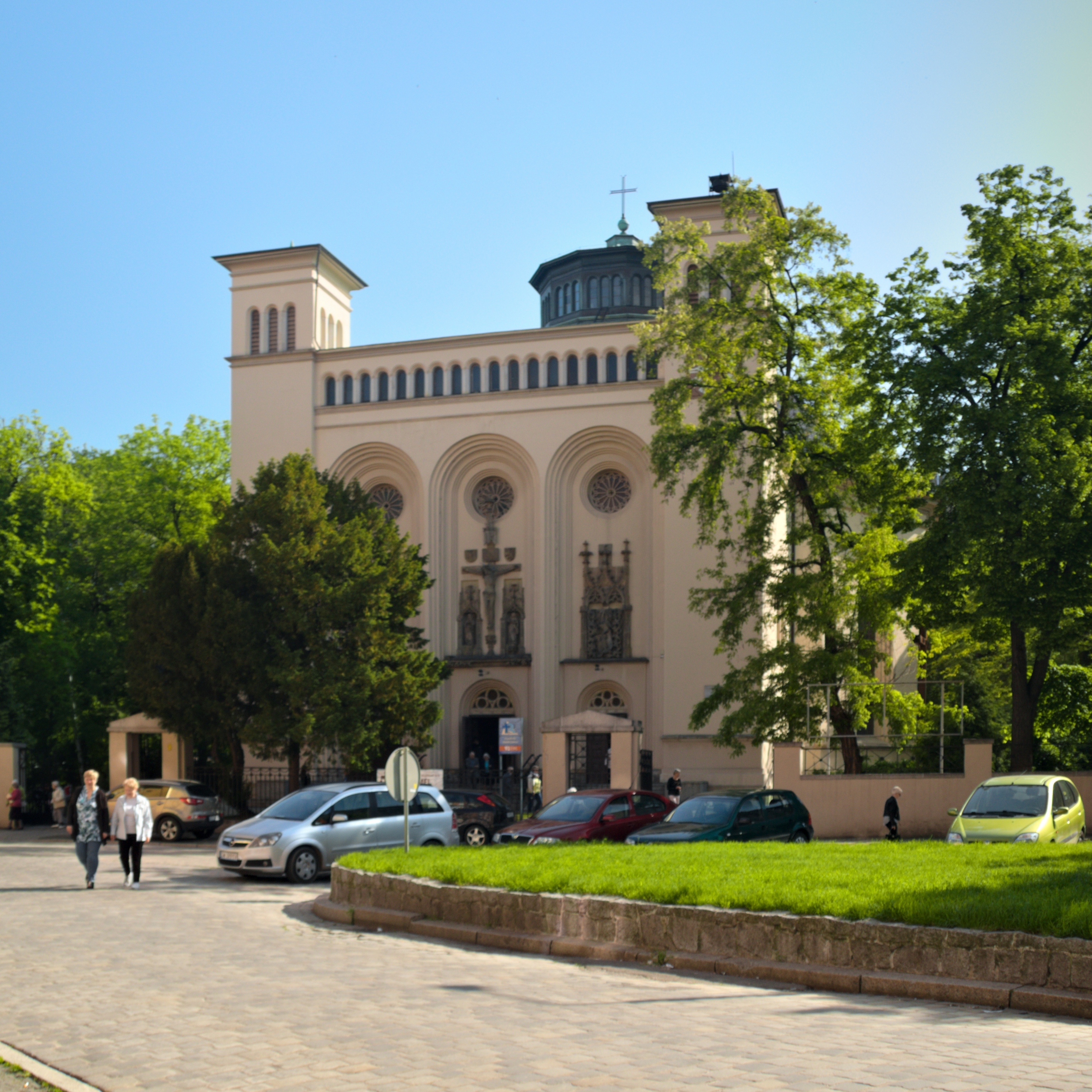 fasada kościoła św. Opieki św. Józefa we Wrocławiu